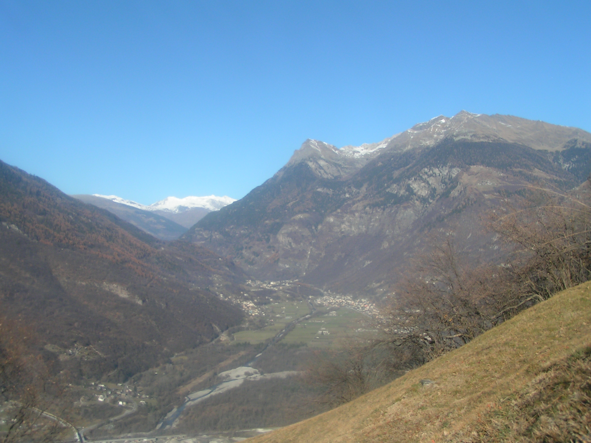 Valle di Blenio